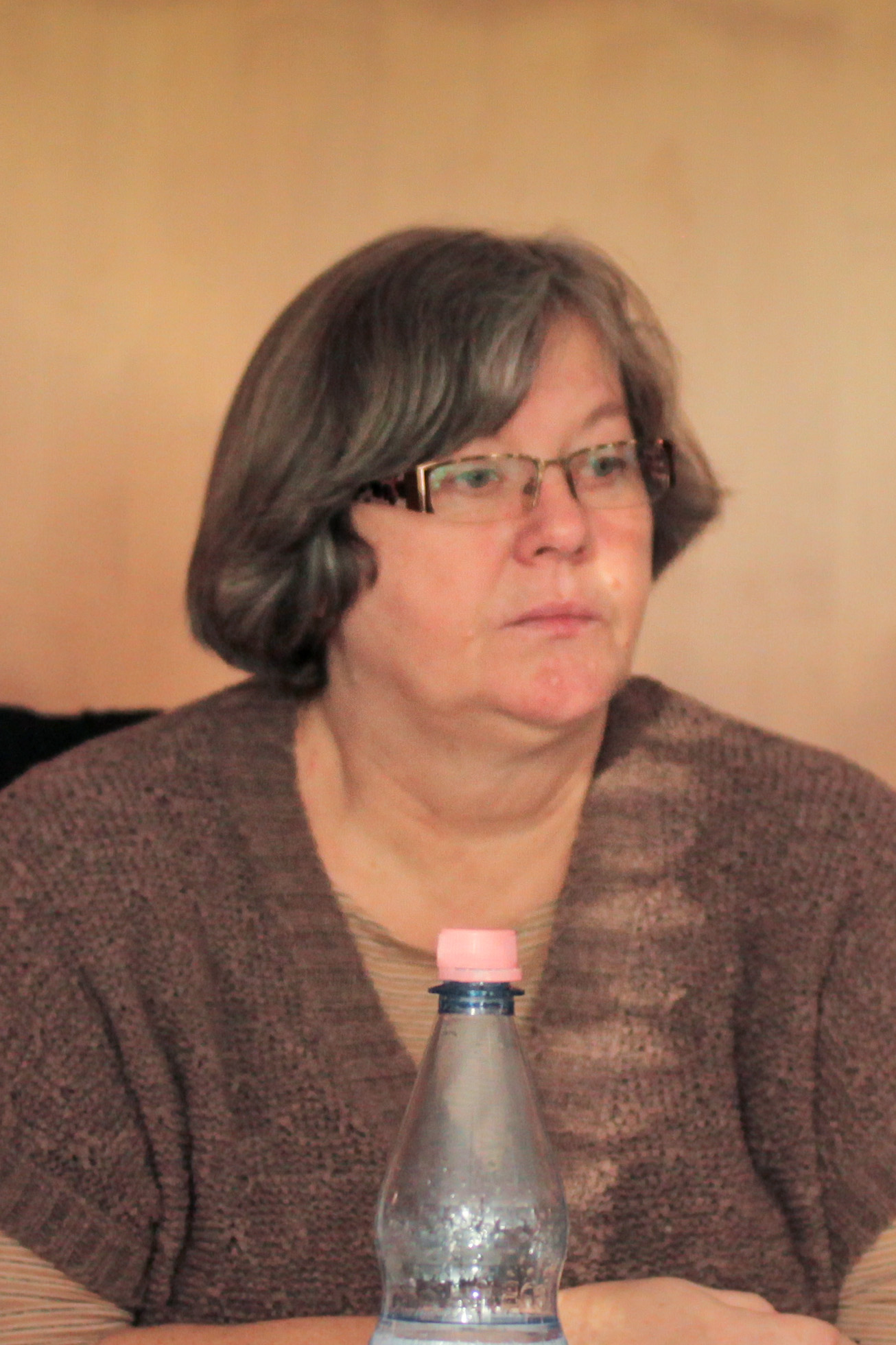 Rosemarie Hein Studierendenkonferenz »Krise.Bildung.Zukunft.« am 11. Dezember 2011 in Berlin